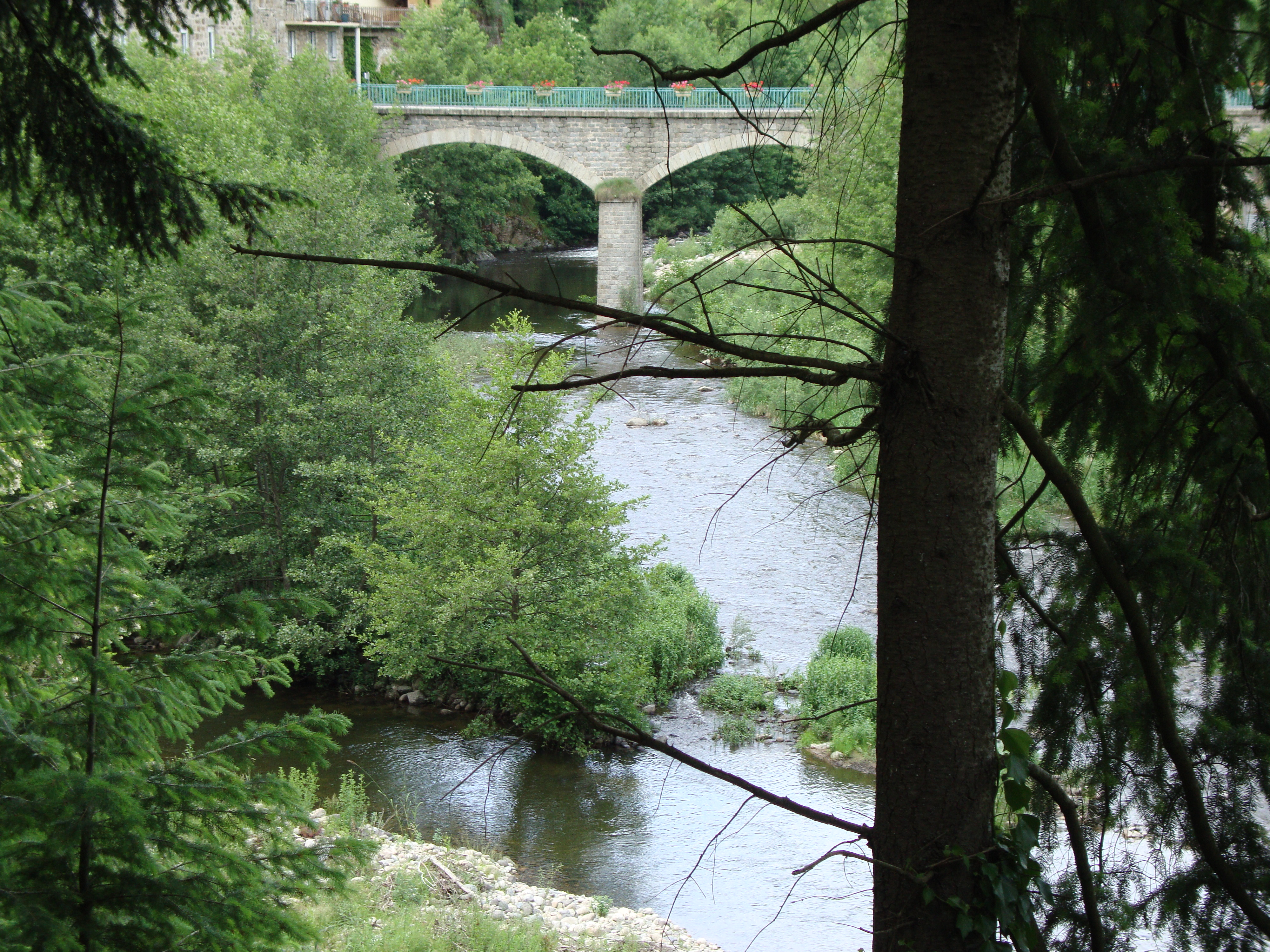 St.Martin-de-Valamas (Ardèche) l'Eysse (à gauche) affluent dans l'Eyrieux (avec pont).